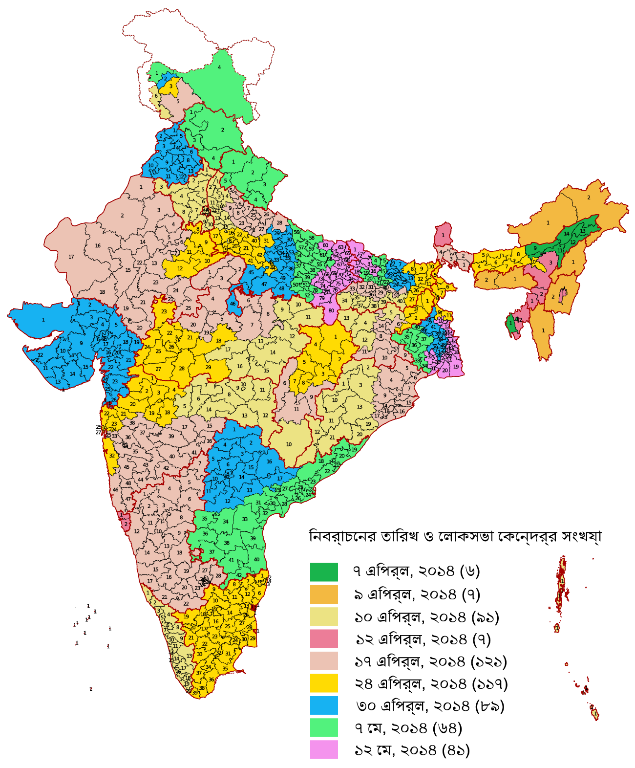 ভারতের সাধারণ নির্বাচন, ২০১৪: নির্বাচনের তারিখ ও লোকসভা কেন্দ্রের সংখ্যা